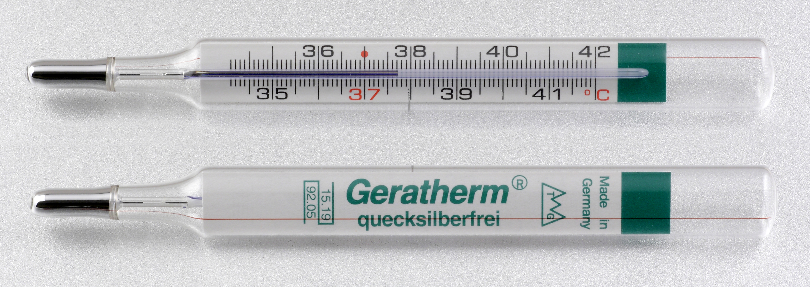 Glasfieberthermometer mit Galinstan-Füllung (Montage aus 2 Einzelbildern)